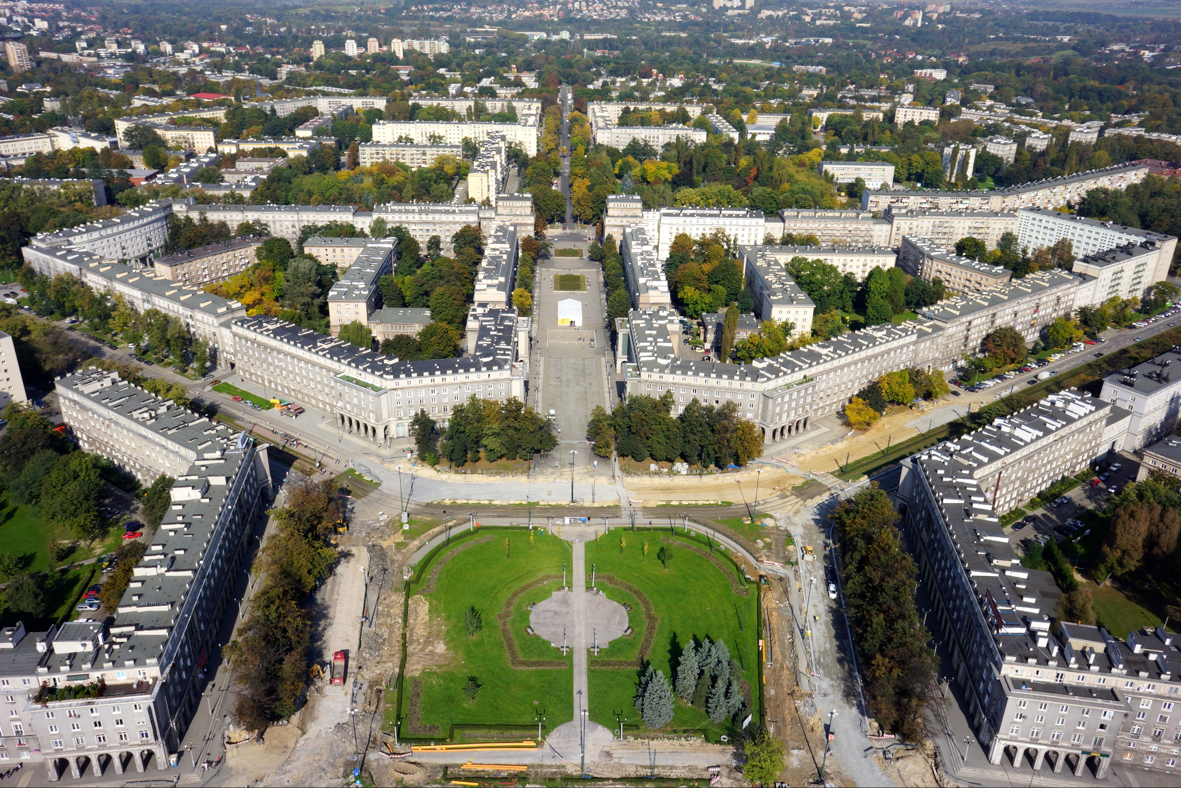 Kraków, układ_urbanistyczny, 1949-1956